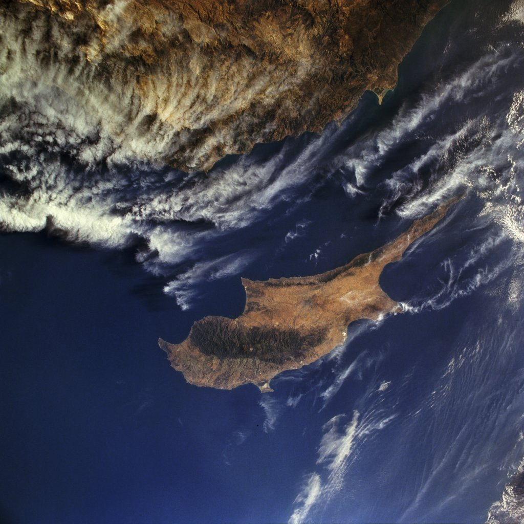 Zypern aus dem Weltall